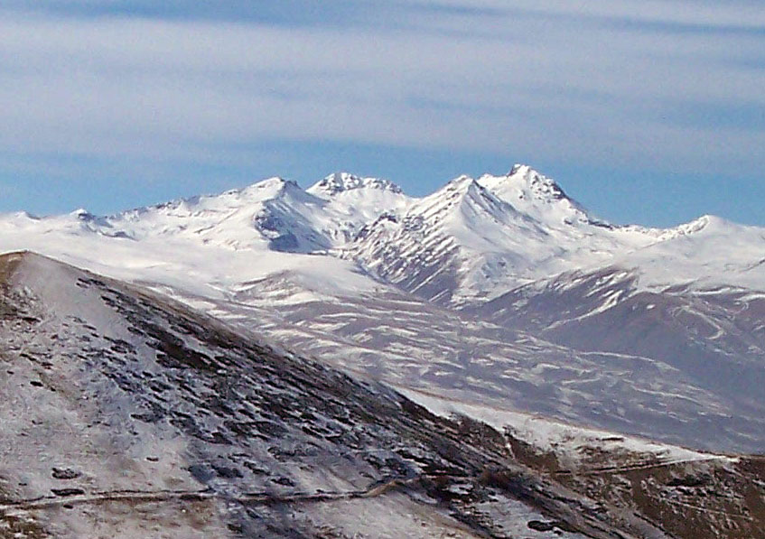 Aragats from "Arai ler" (Armenia)